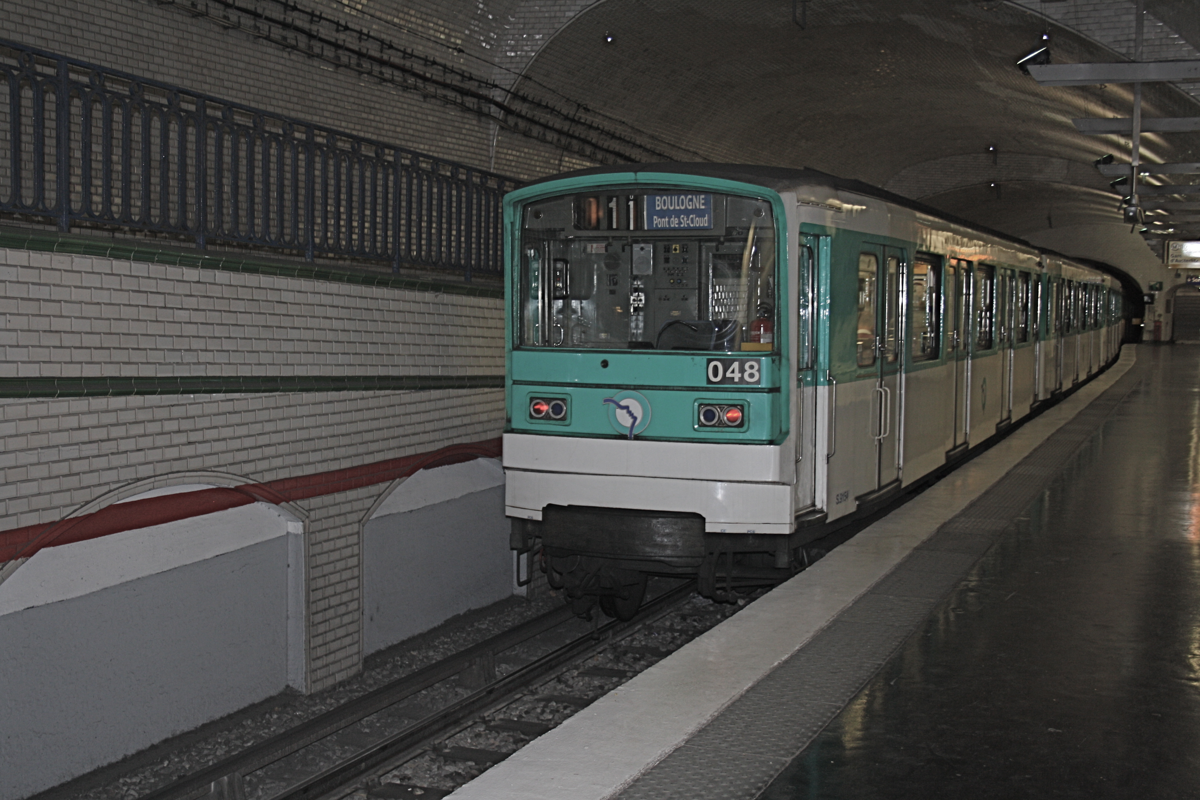 MF 67 in der Pariser Métrostation Mirabeau